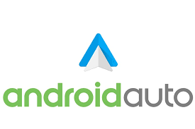 Logo d'Android Auto